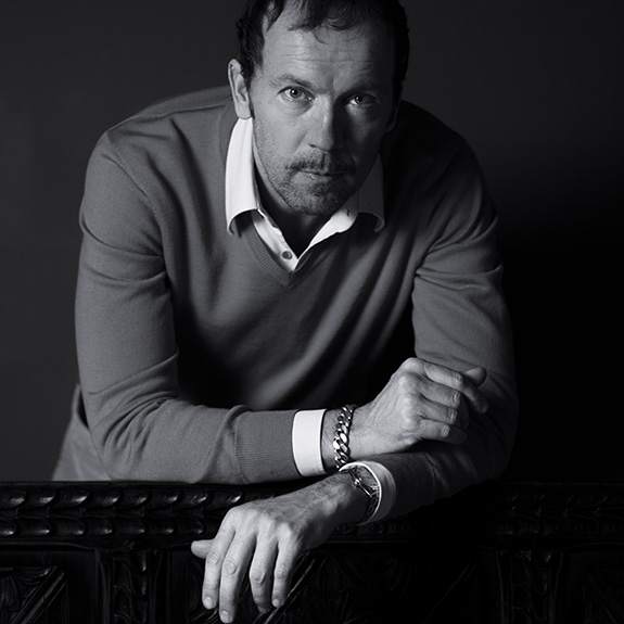 Portret van Oscar van den Boogaard